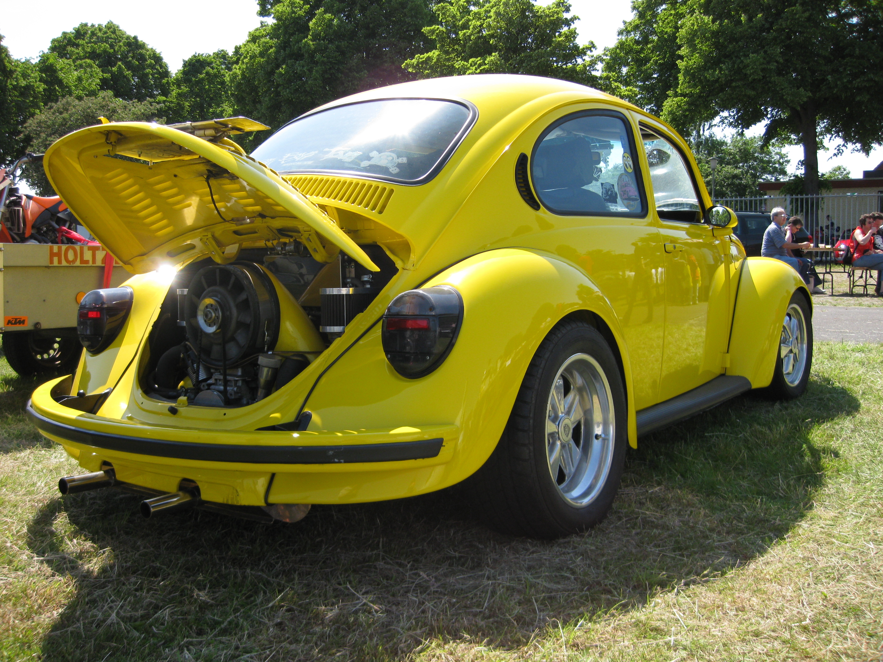 getunter VW Käfer